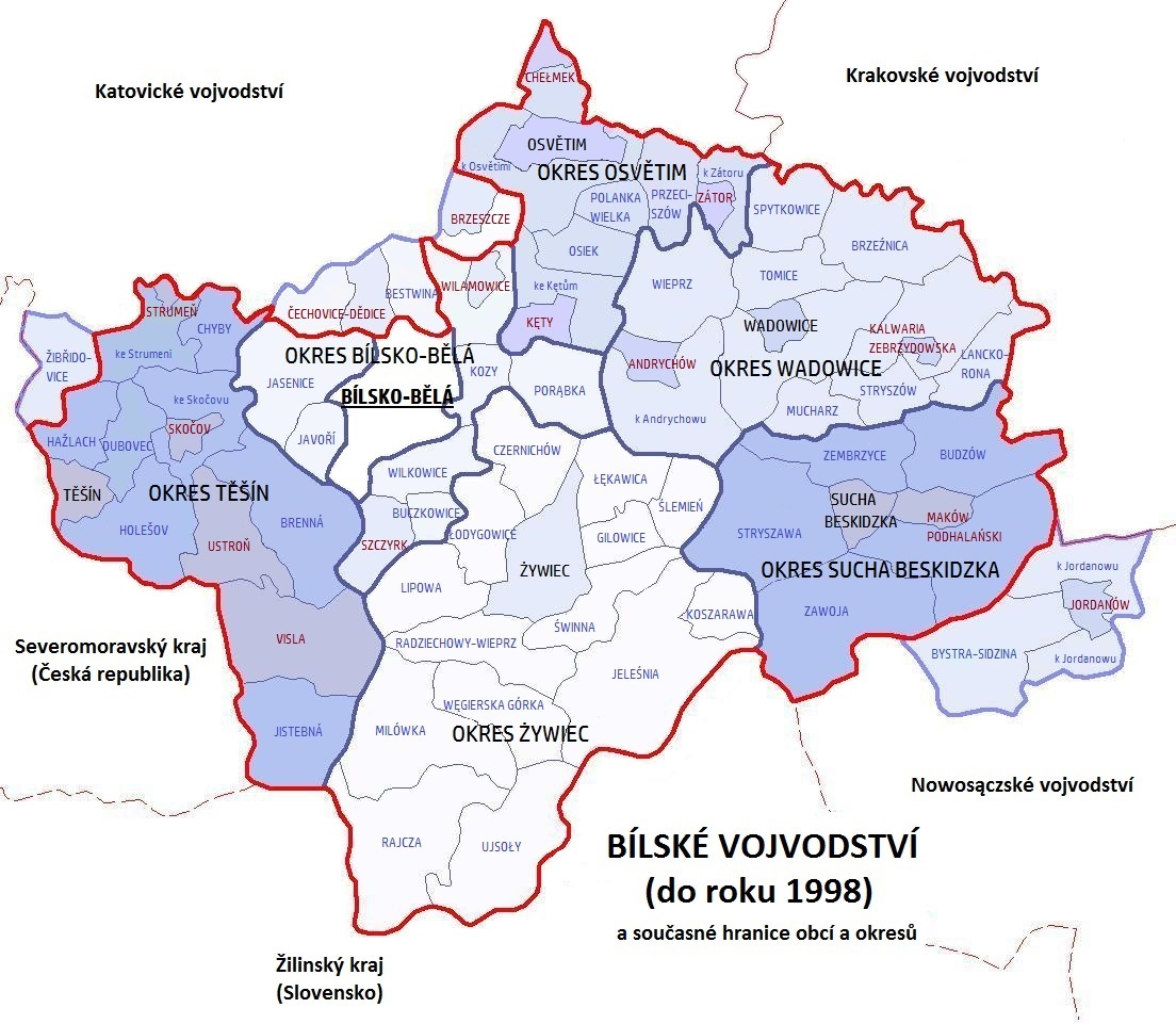 Bílské vojvodství (1975-1998) a současné hranice obcí a okresů.